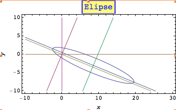 Esta gráfica representa una elipse girada con un cierto ángulo.